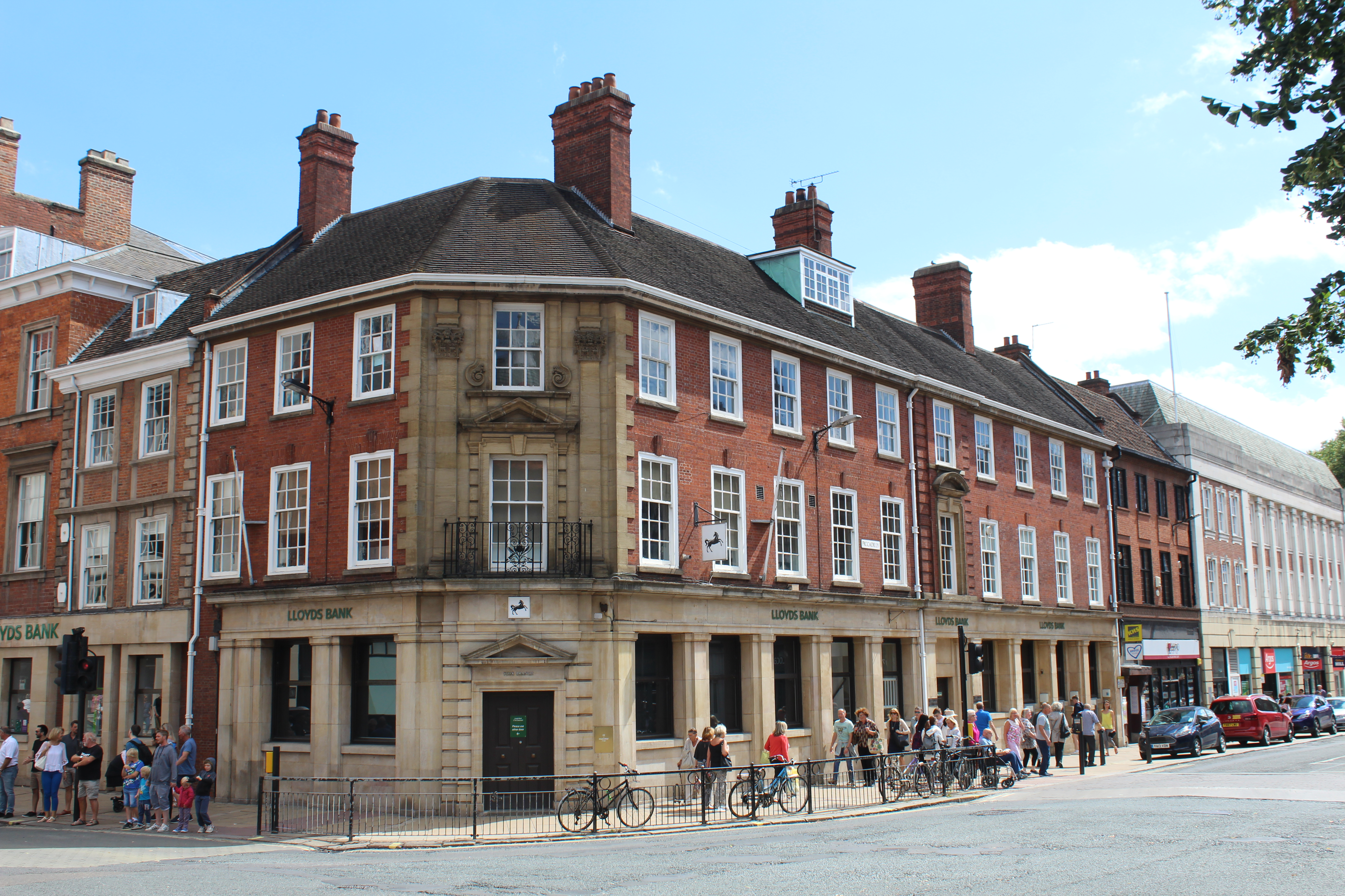 Banque, Pavement, Picadilly, York.